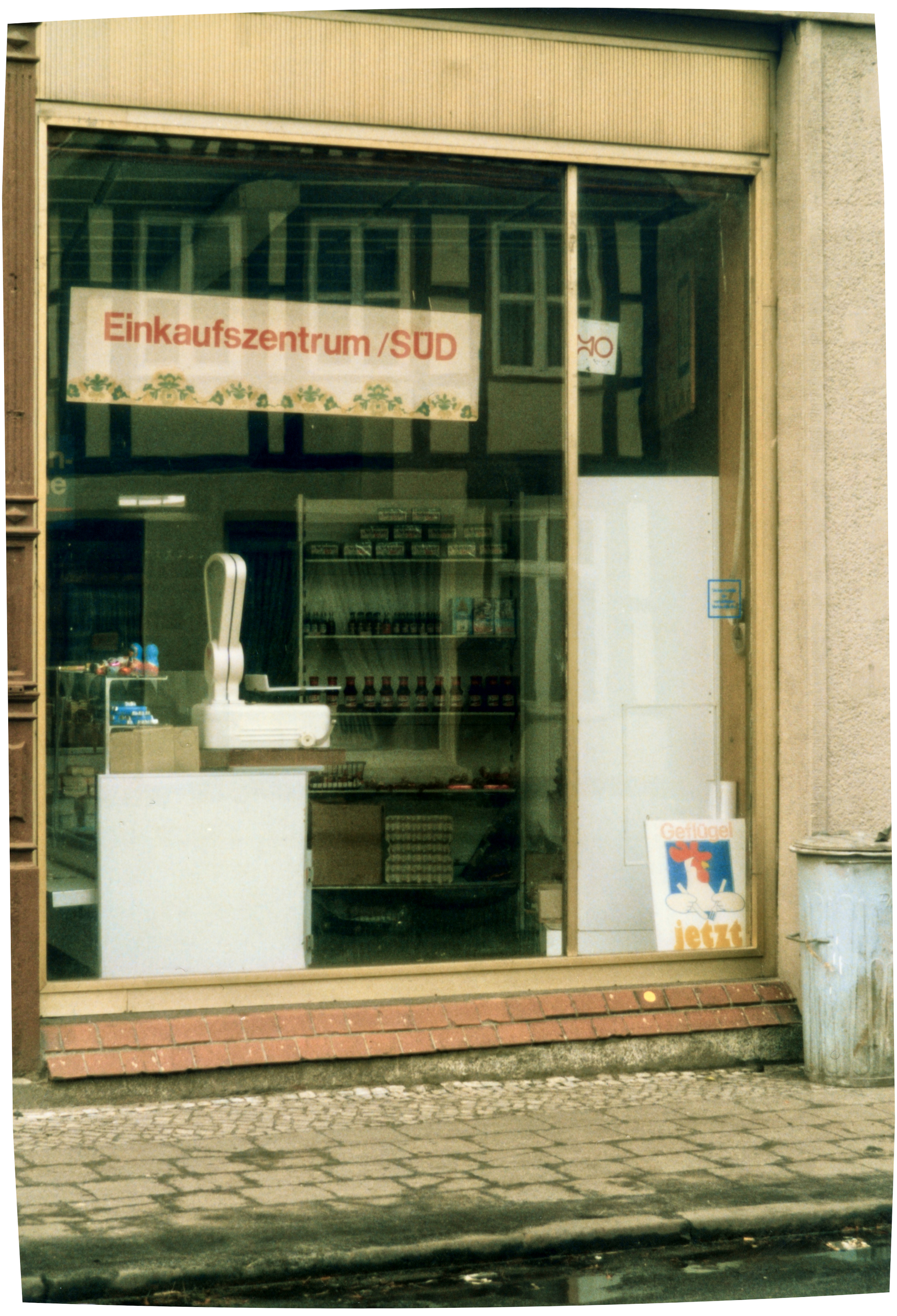 "Einkaufszentrum" zu DDR-Zeiten - hier Salzwedel